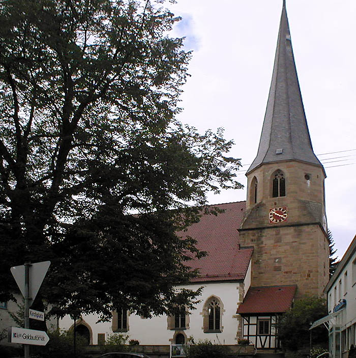 Pfarrkirche St. Martin in Kleingartach